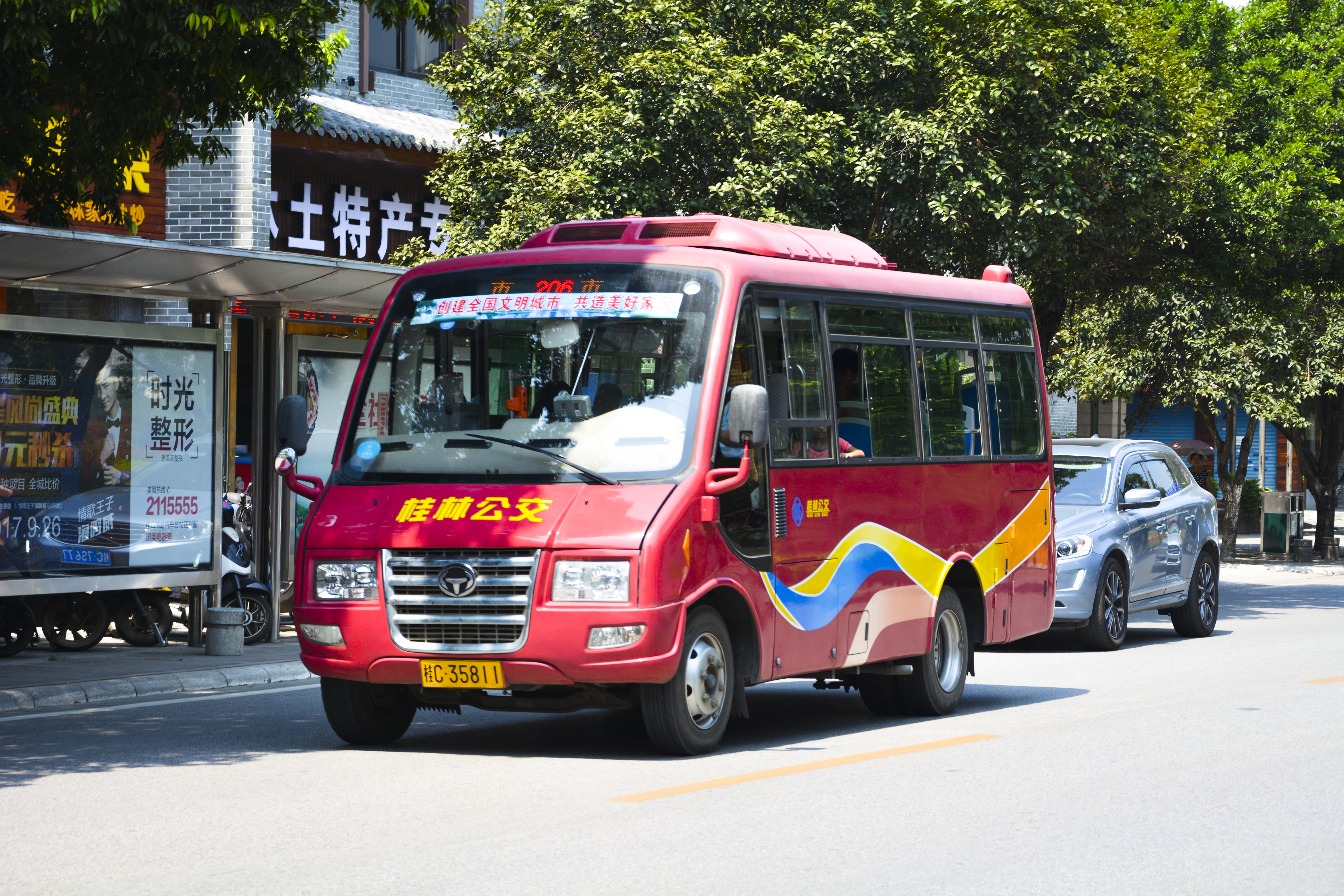 桂林公交车辆展示---重庆恒通CKZ6590NB5（206路）